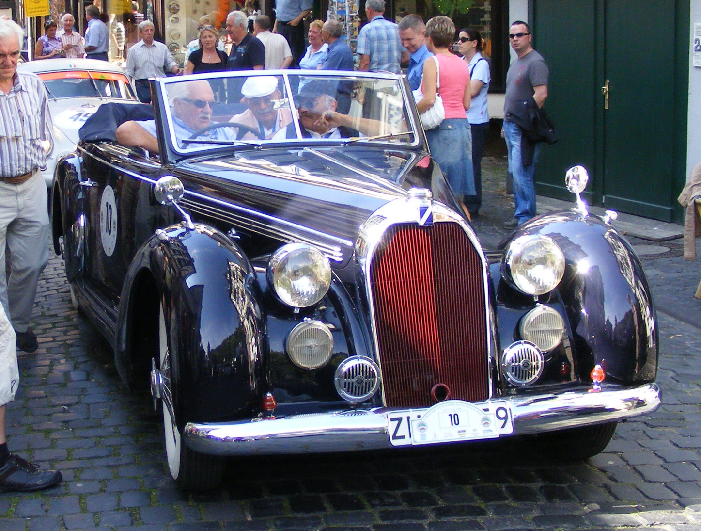 Talbot T26 Record (1947) Cabriolet, karrossiert von Worblaufen; in Monschau 2008